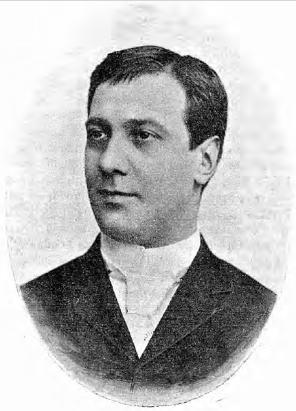 Grigore Manolescu (n. 29 martie 1857 - d.14 iulie 1892) a fost un actor român, unul din star-urile teatrului românesc de la sfârșitul veacului al 19-lea, rămas celebru, între altele, pentru interpretarea rolului lui Hamlet.